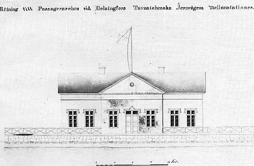 Luonnospiirustus Helsingin ensimmäiseksi rautatieasemaksi. Asemavaihtoehdoista pienin.